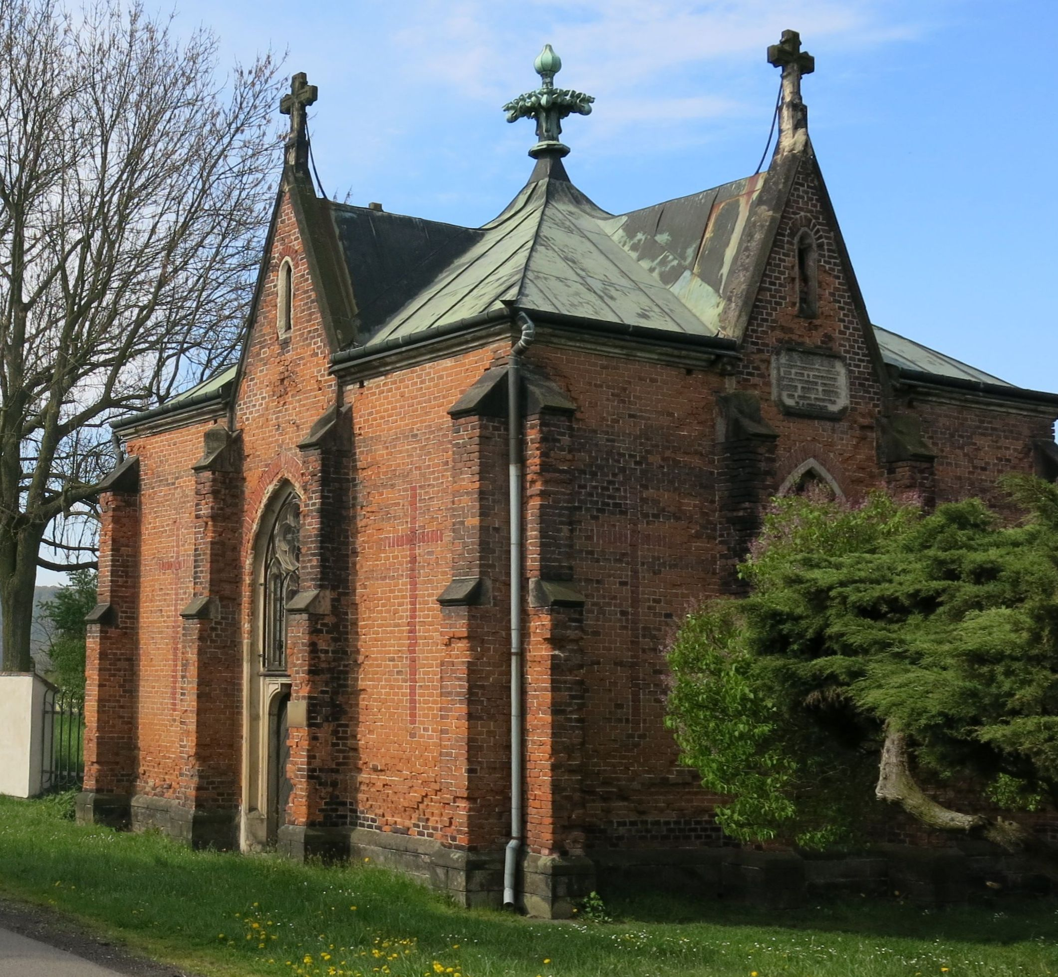 Hrobka, Valtířov.